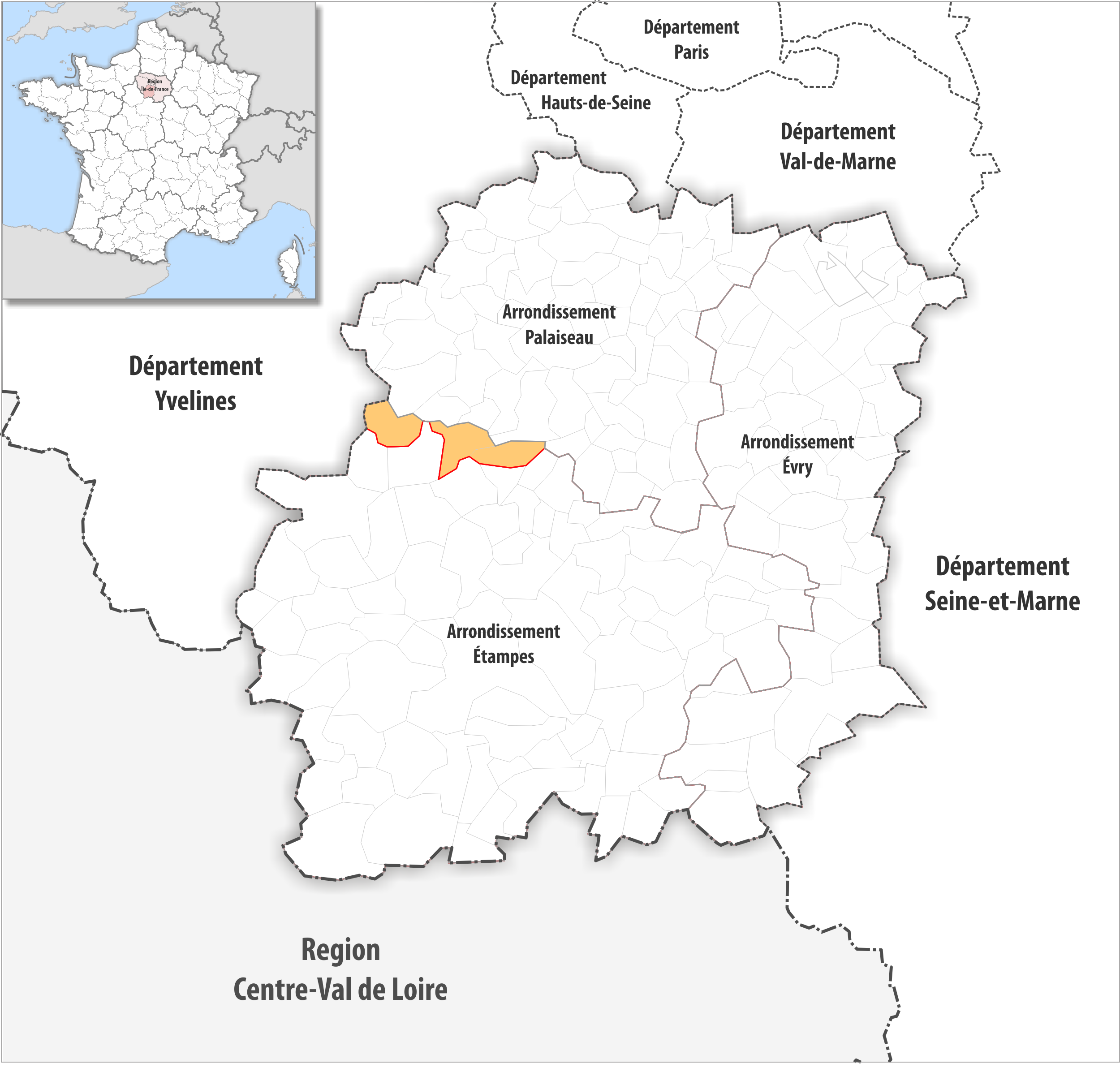 Arrondissements Anpassungen auf 2017 im Departement Essonne